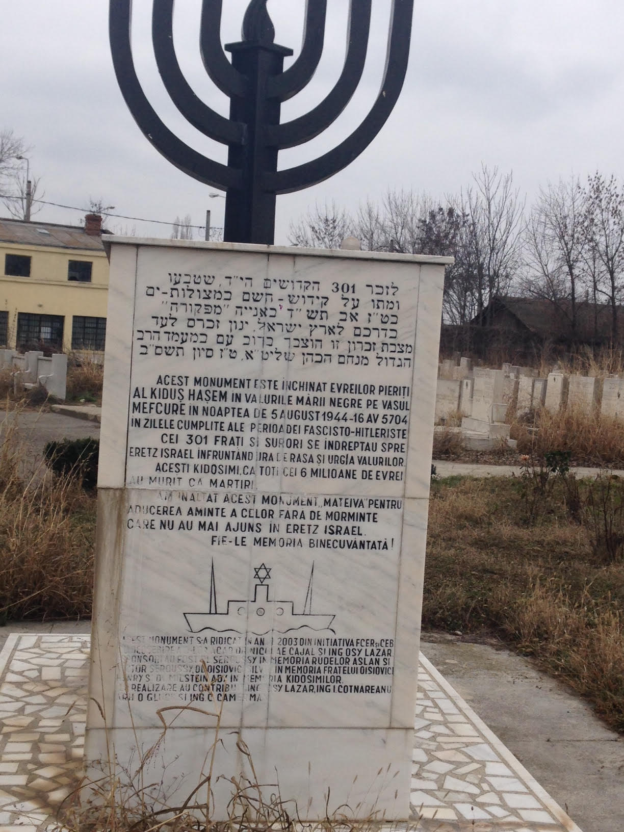 מצבה לזכר הנספים באונייה מפקורה בבית הקברות היהודי בבוקרשט